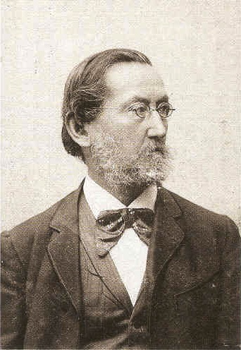 Heinrich Leutemann (1824-1905) Deutscher Maler und Illustrator